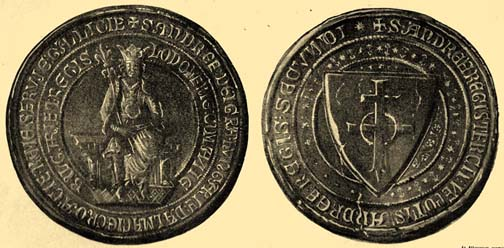 Ondřej III.- denáry